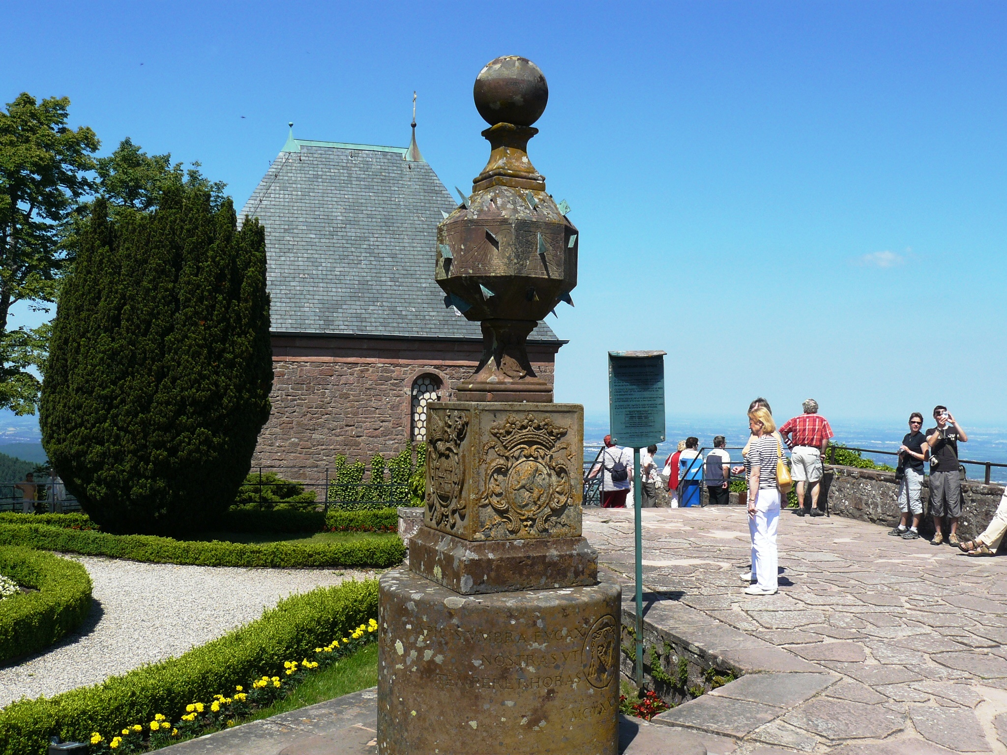 Cadran solaire du XVIIIe siècle provenant de l'ancienne abbaye de Neuenbourg qui a été installé en 1935 au Mont Sainte-Odile